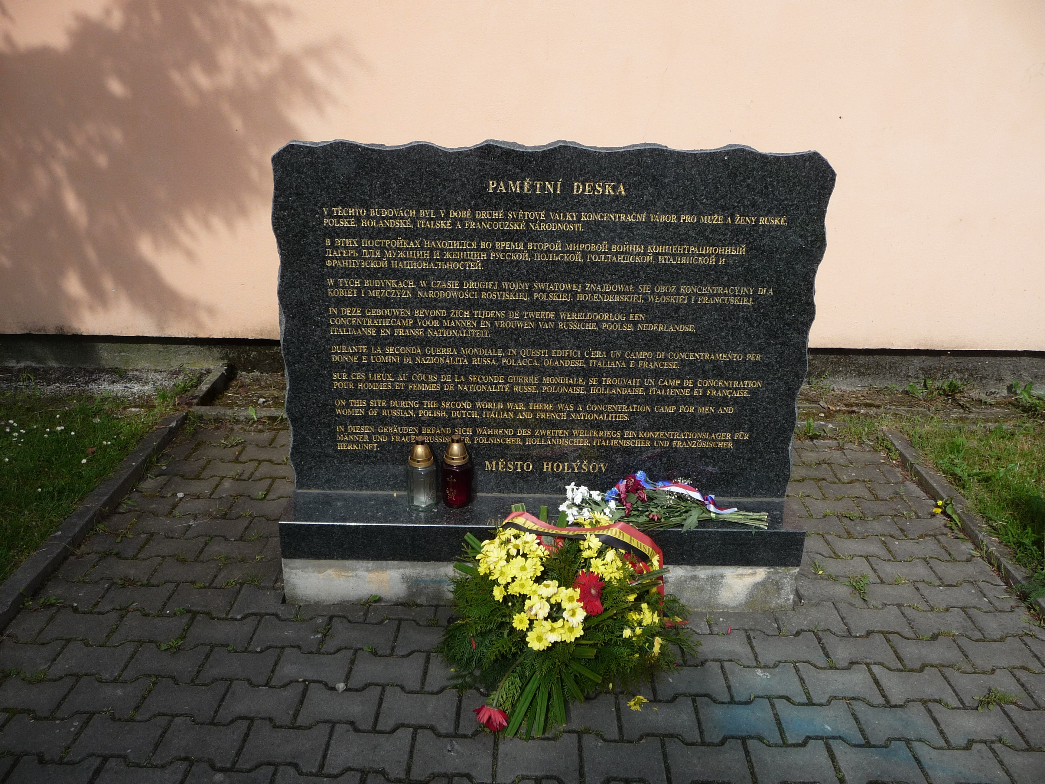 Tablica upamiętniajaca oswobodzenie obozu koncentrayjnego w Holyszowie.